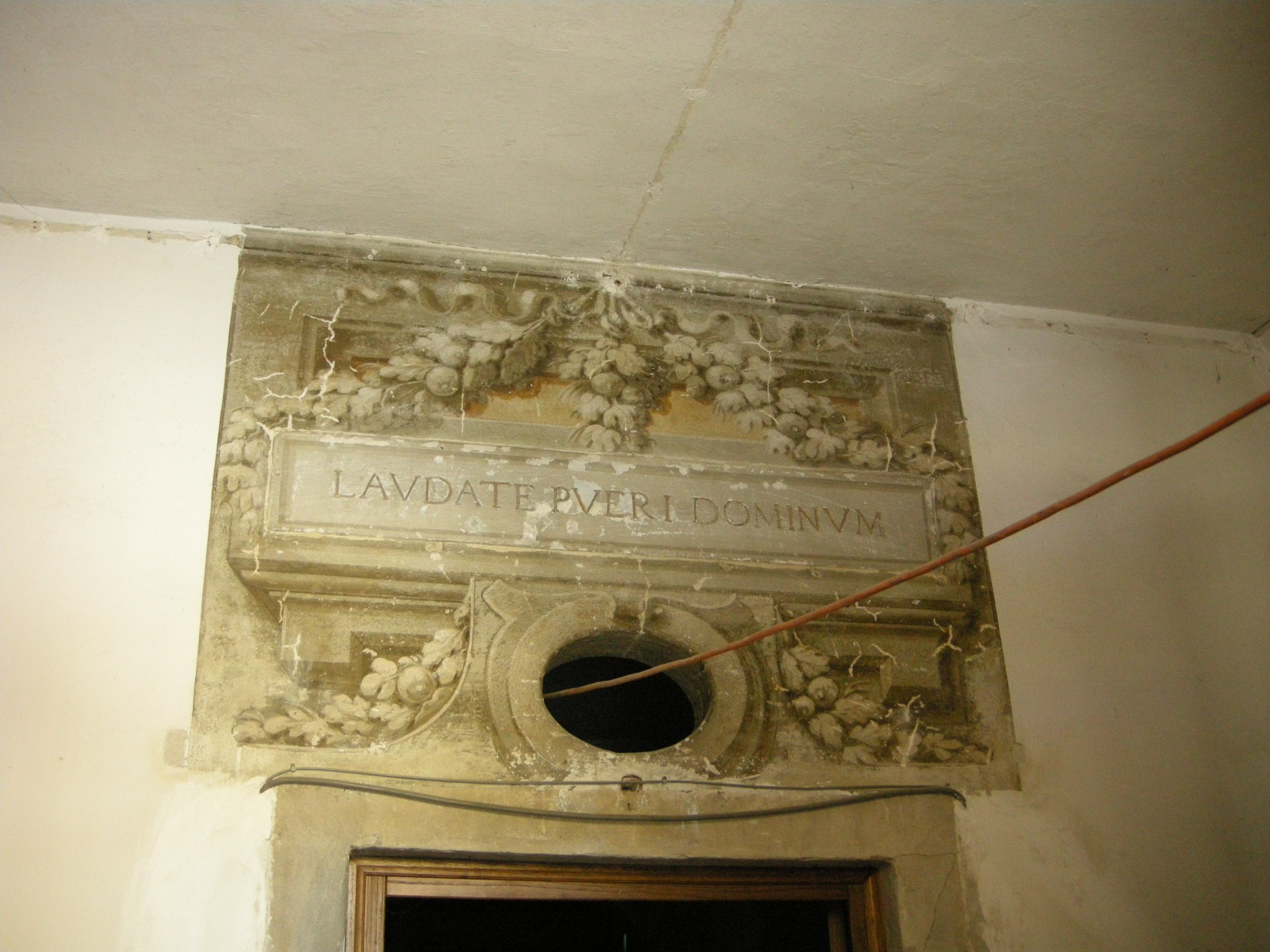 Oratorio di San Niccolò del Ceppo, interno